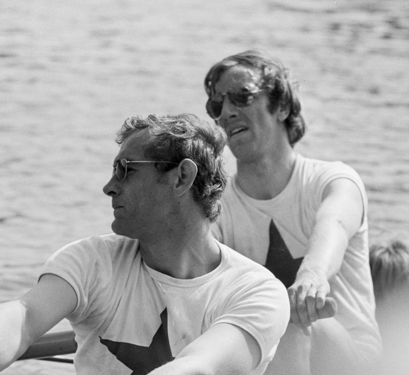 Nationale roeiwedstrijden op Bosbaan; winnaar elite twee met stuurman Aegir, Huizinga (l) en Offens (r)